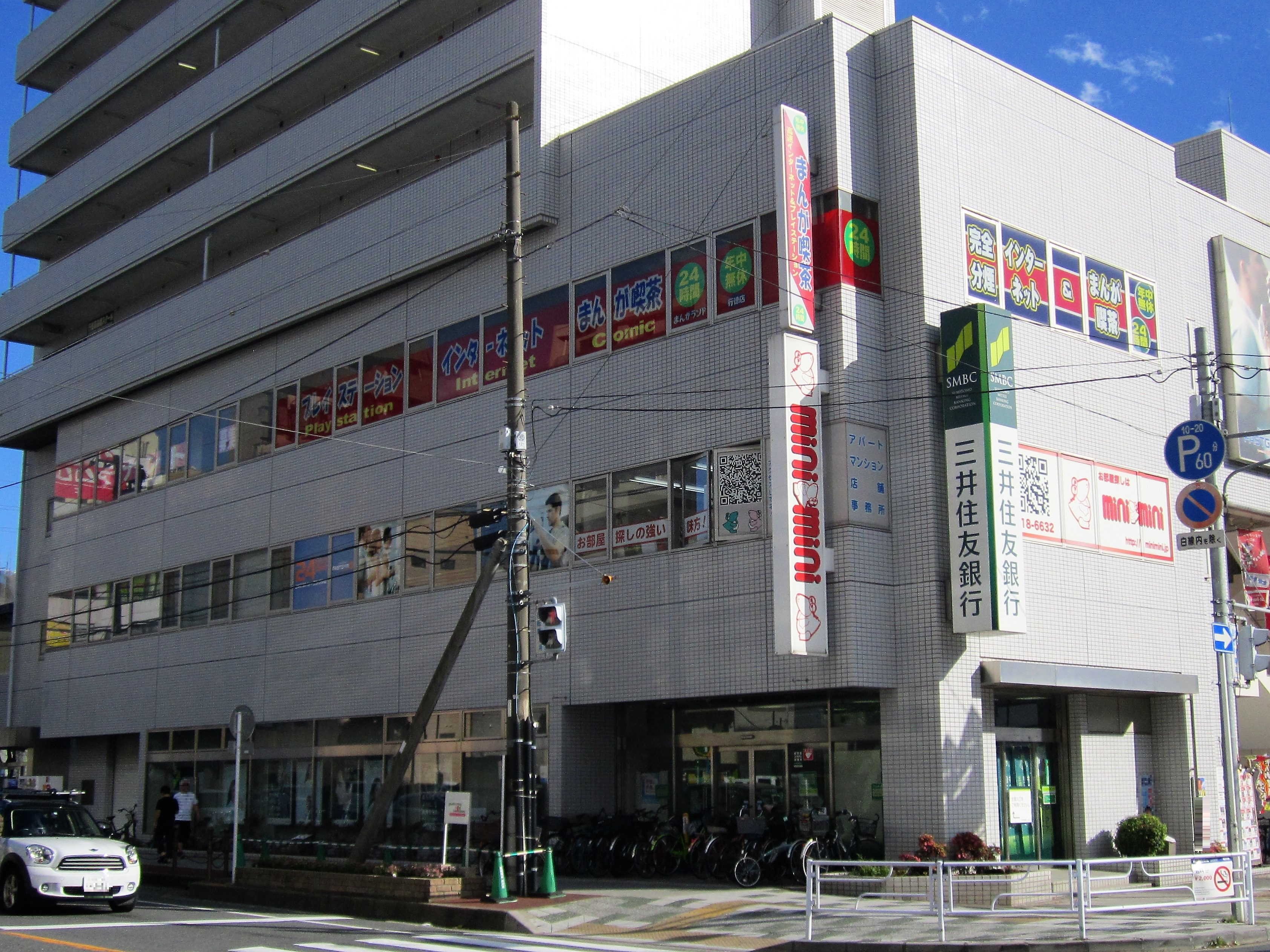 三井住友銀行行徳支店（市川市行徳駅前）